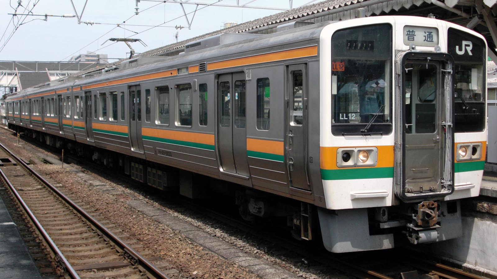 JR東海211系5000台（クモハ211-5033ほか）、沼津駅にて撮影。集電装置がシングルアーム型パンタグラフに換装された。前面窓下部に編成番号標記がなされている。